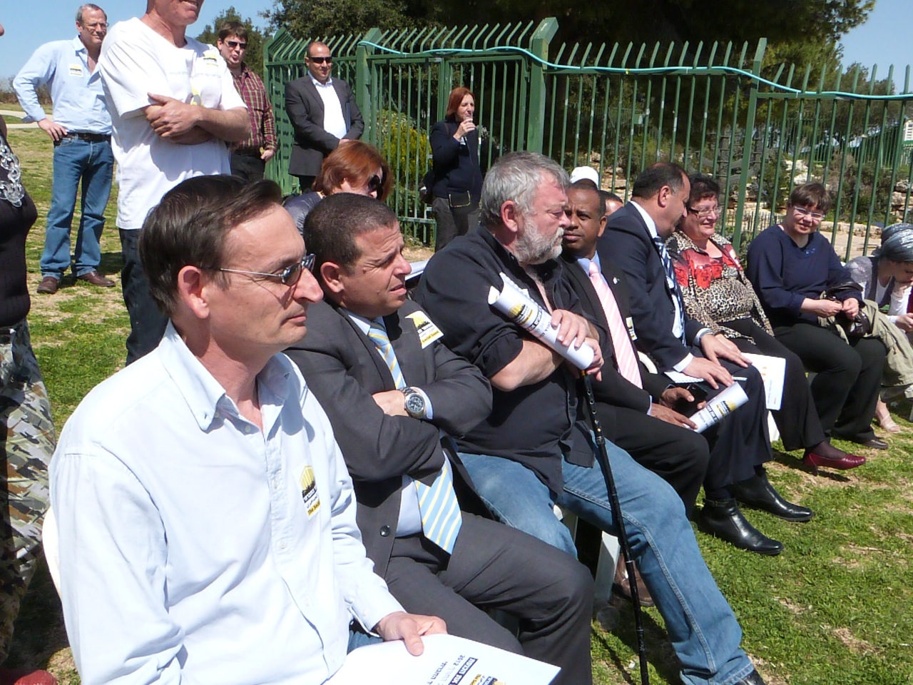 טקס הענקת המדד החברתי הראשון. משמאל לימין: דב חנין, , איתן כבל, אילן גילאון, שלמה מולה, מגלי והבה, מרינה סולודקין